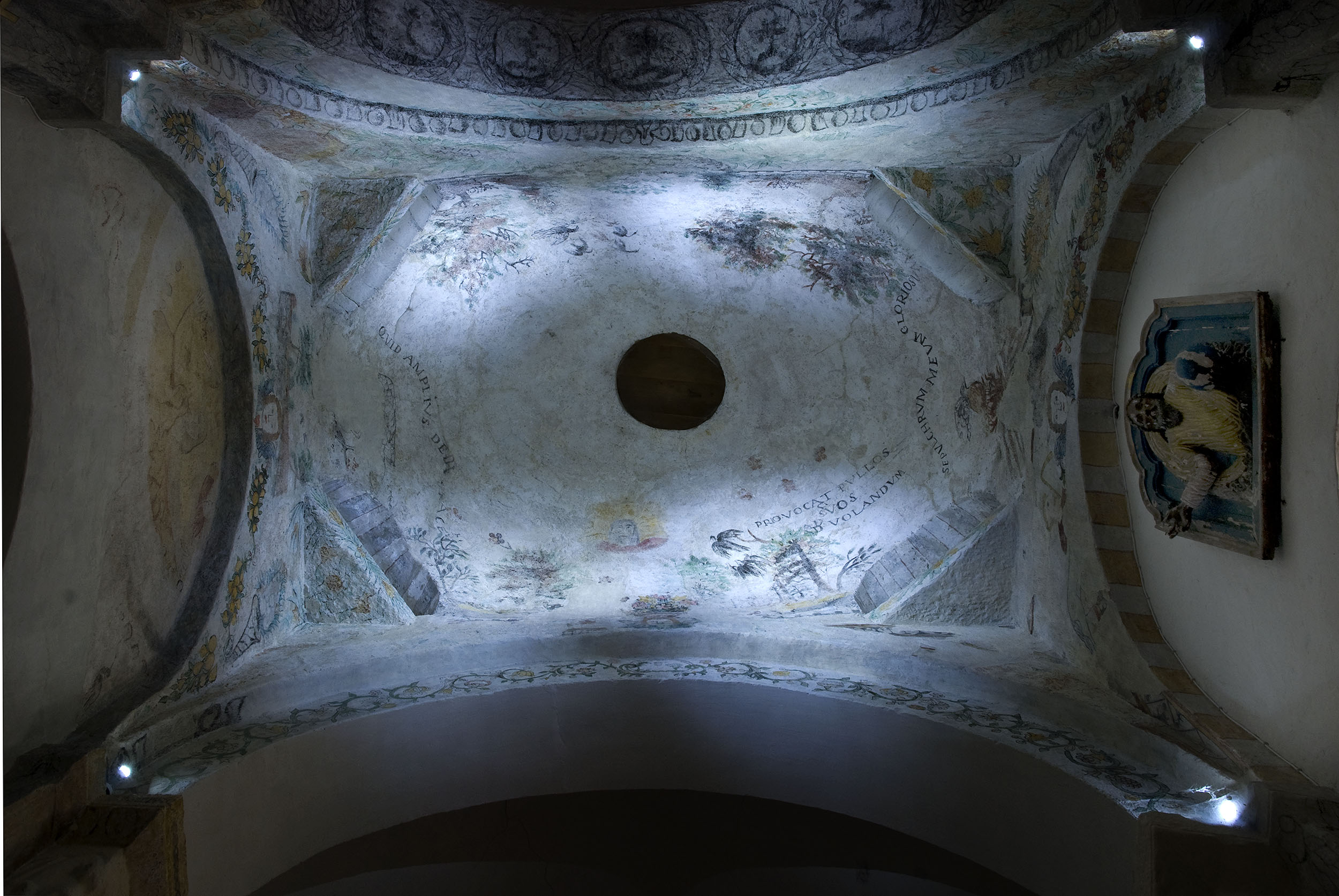 Coupole de l'église Sainte Agathe de Sainte Marie, Cantal, France. Fresques du XVIIème siècle.